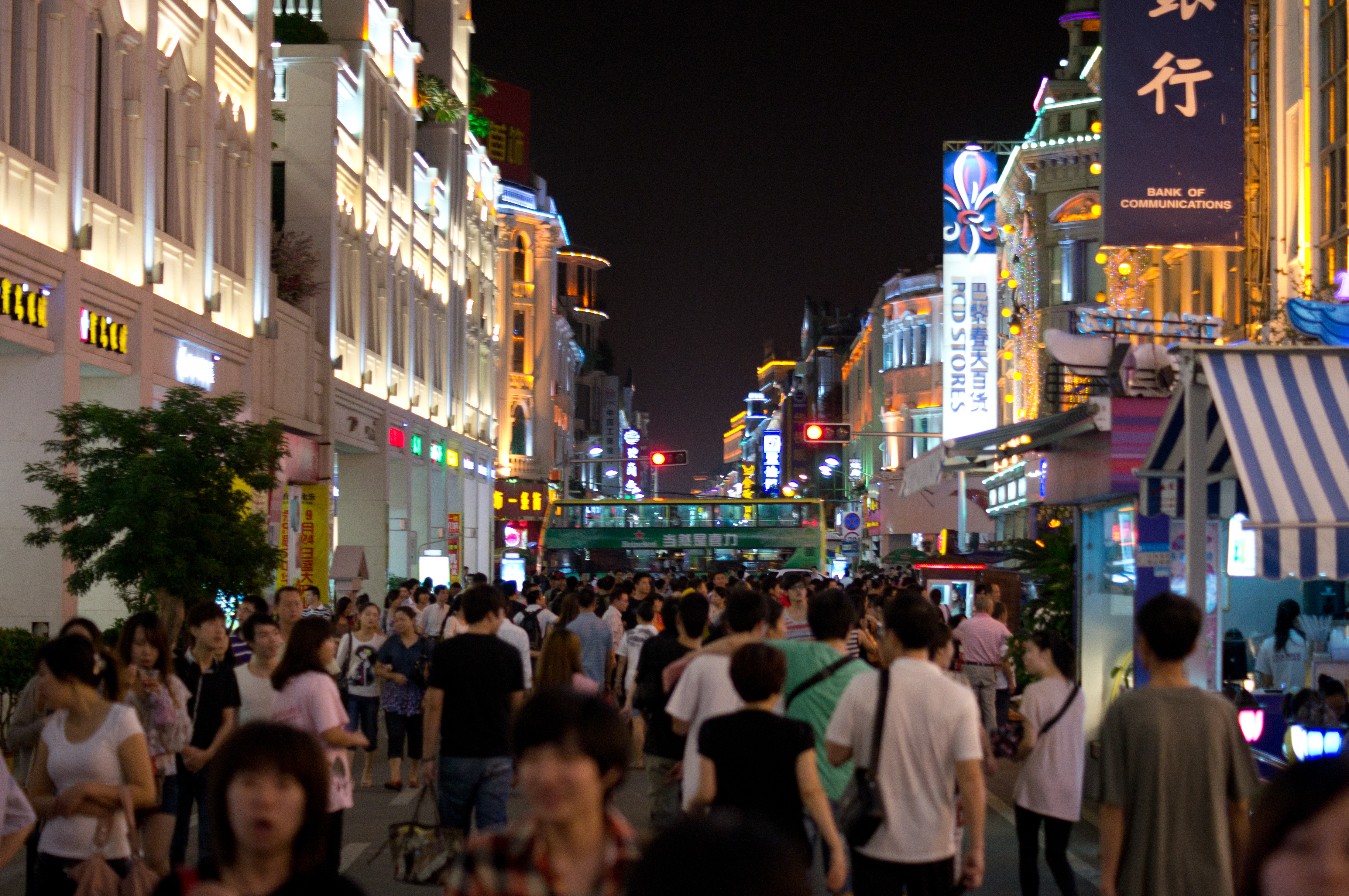 厦门中山路